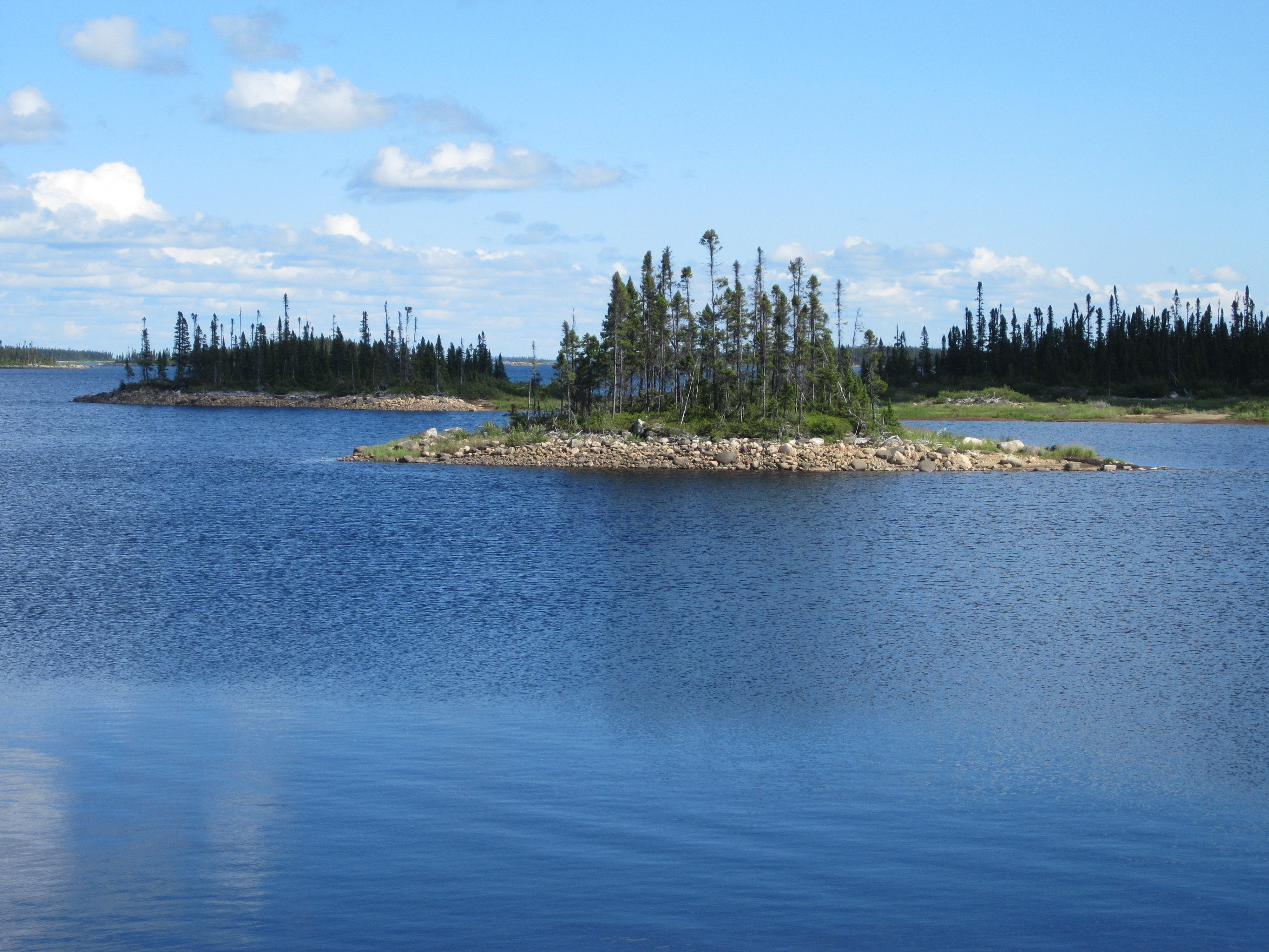 Reservoir Ossokmanuan